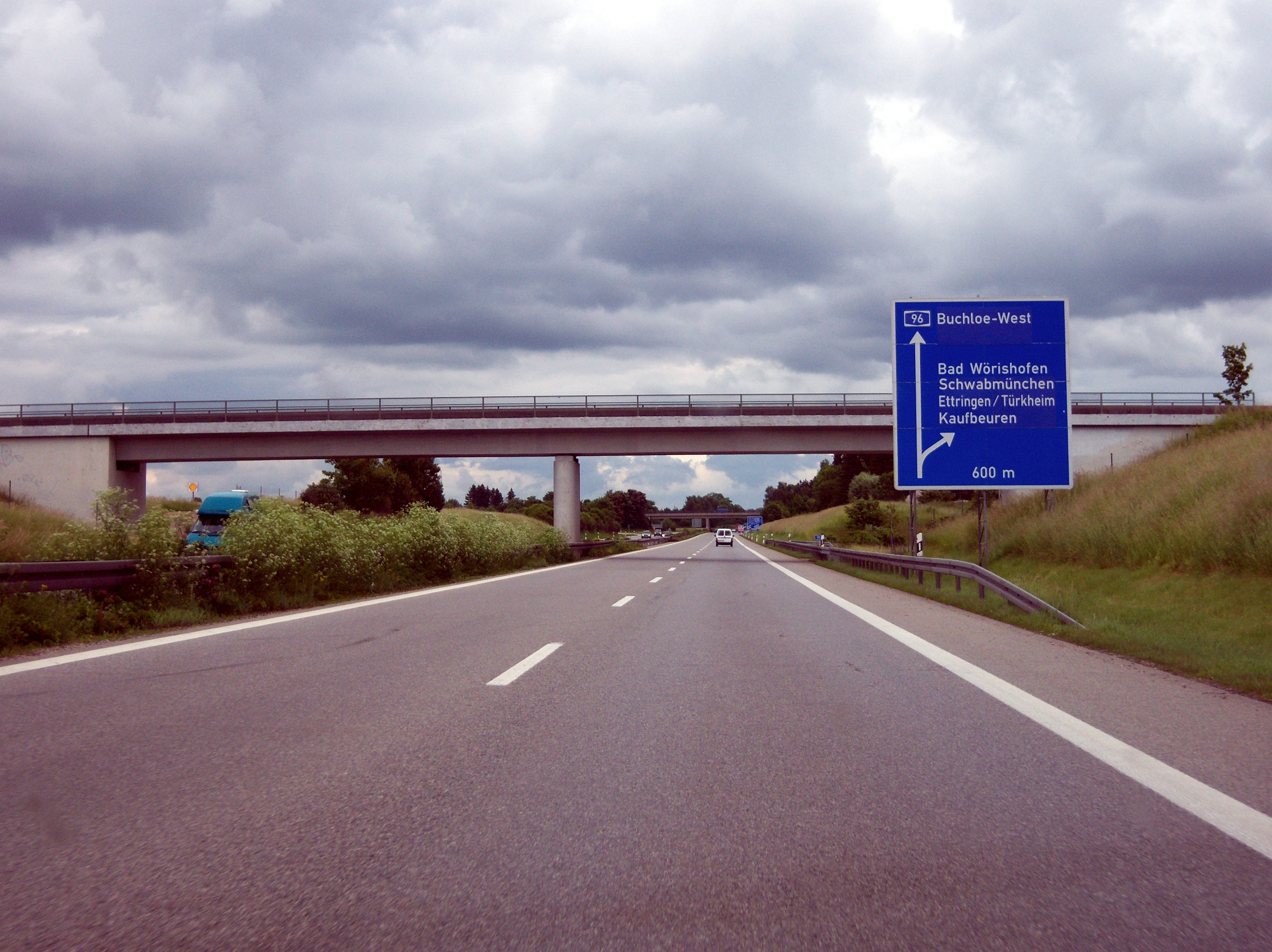 Bundesautobahn 96 Richtung München vor der Anschlussstelle Bad Wörishofen